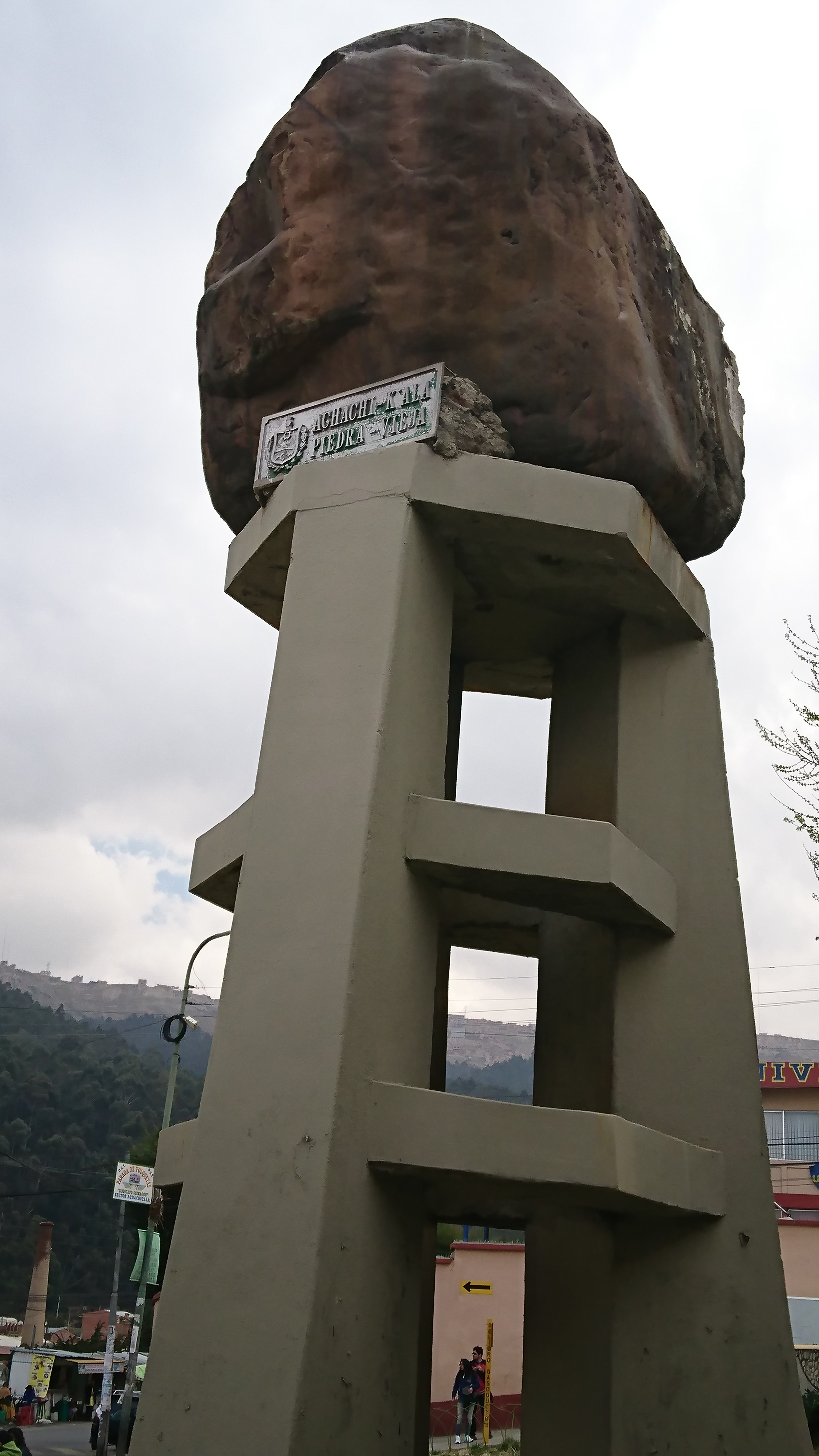 Monumento alusivo al nombre de Achachicala, en la Paz